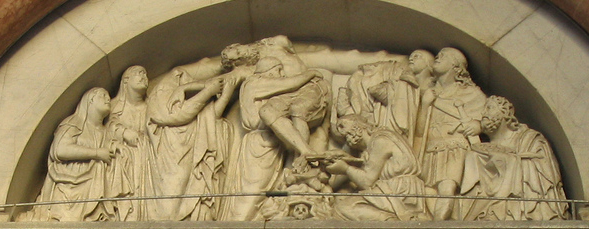 Deposizione, portale del duomo di Lucca by Nicola Pisano Cropped by User:Sailko